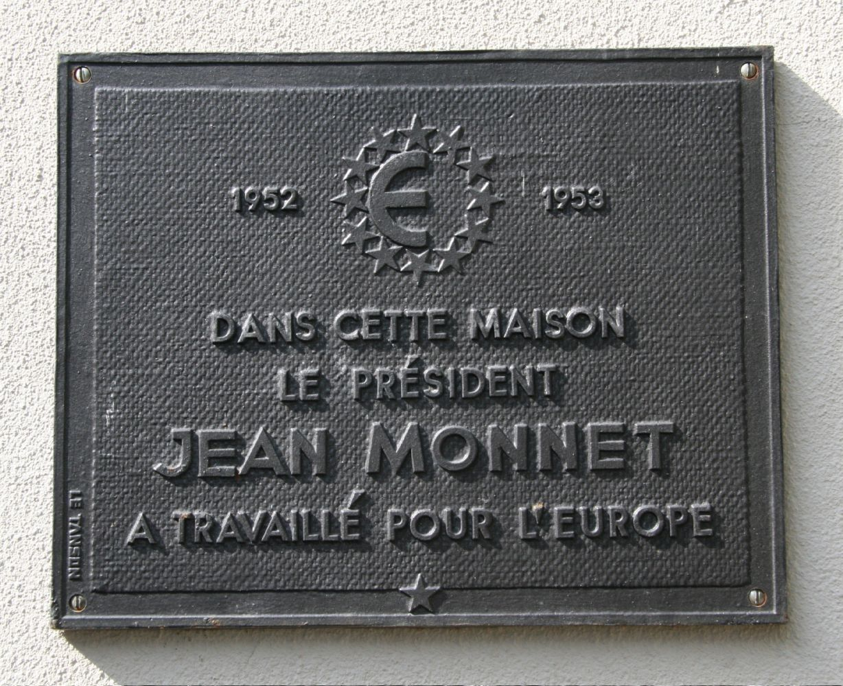 Sujet: Erënnerungsplack vum Lé Tanson un dem Jean Monnet sengem Séjour am Hotel du Grand-Chef zu Munneref an de Joeren 1952-1953